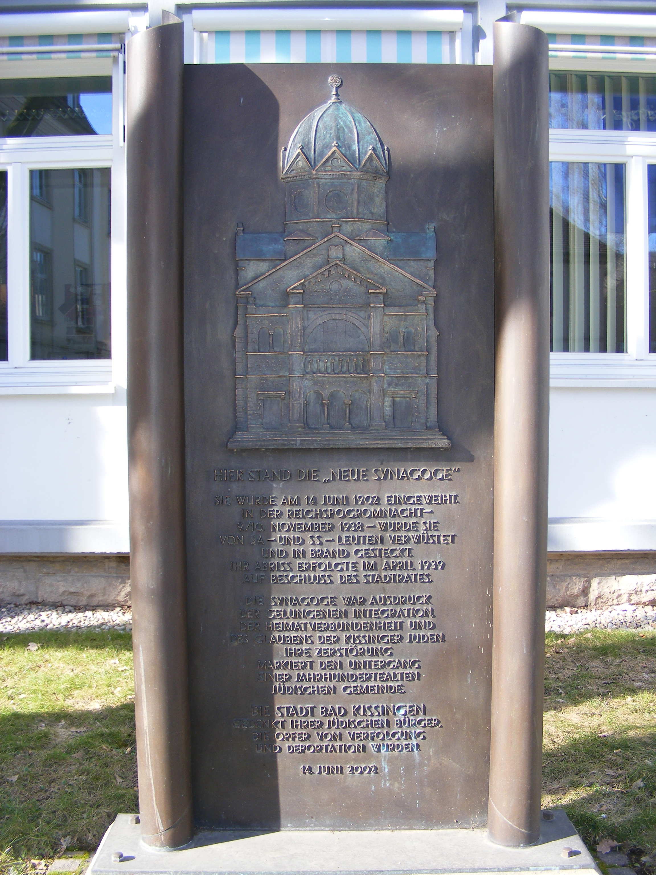 Bad Kissingen - Gedenkplatte zur ehem. Neuen Synagoge am Ort (bronze), Standort: Stadtbauamt, Aufstellungsjahr: 2002.